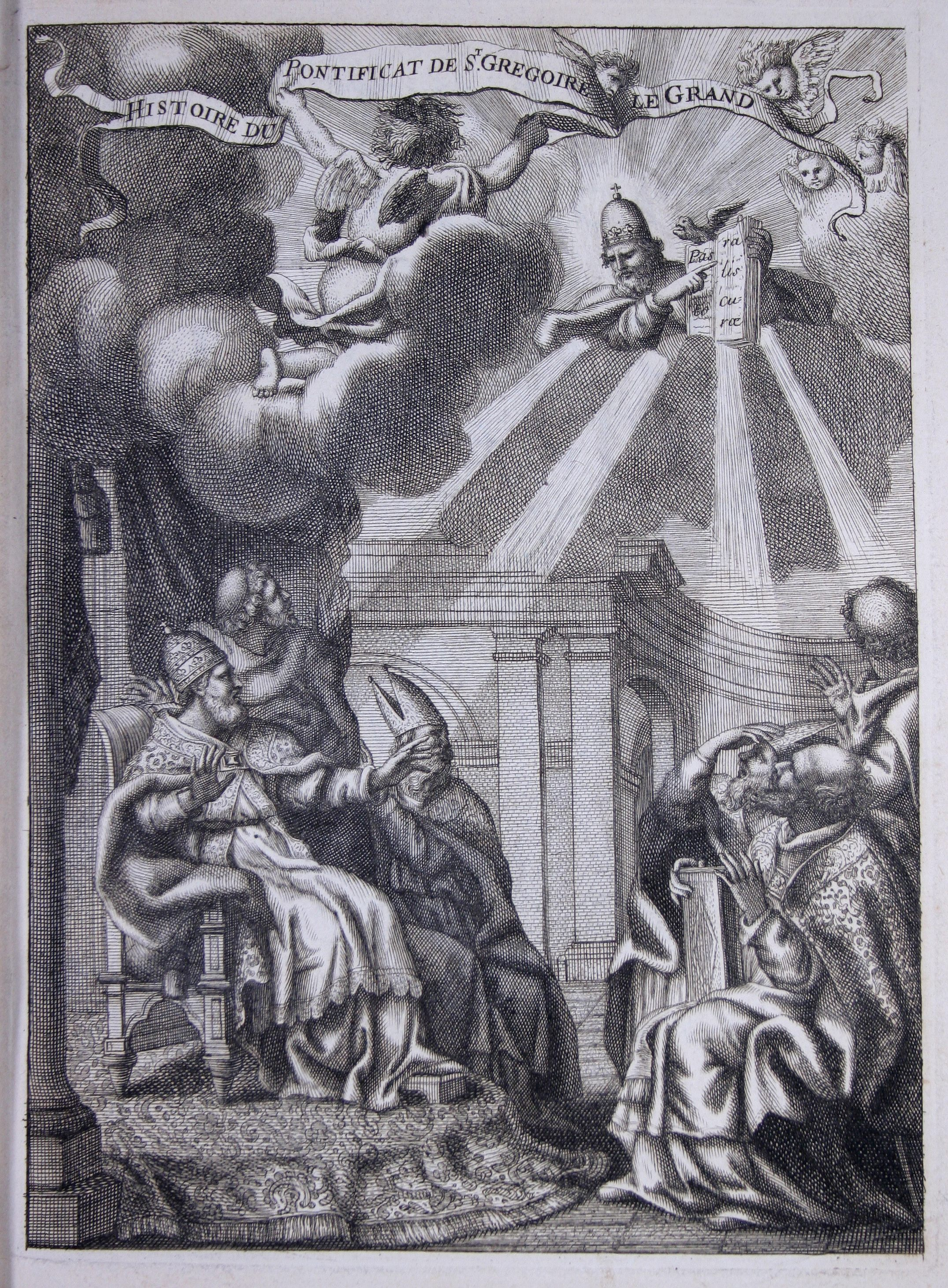 Grégoire le Grand dictant la réforme liturgique sous l'inspiration de l'Esprit Saint - Gravure illustrant Histoire du pontificatat de Saint Grégoire le Grand Maimbourg, 1686 (exemplaire de la bibliothèque patrimoniale de Gray (France).